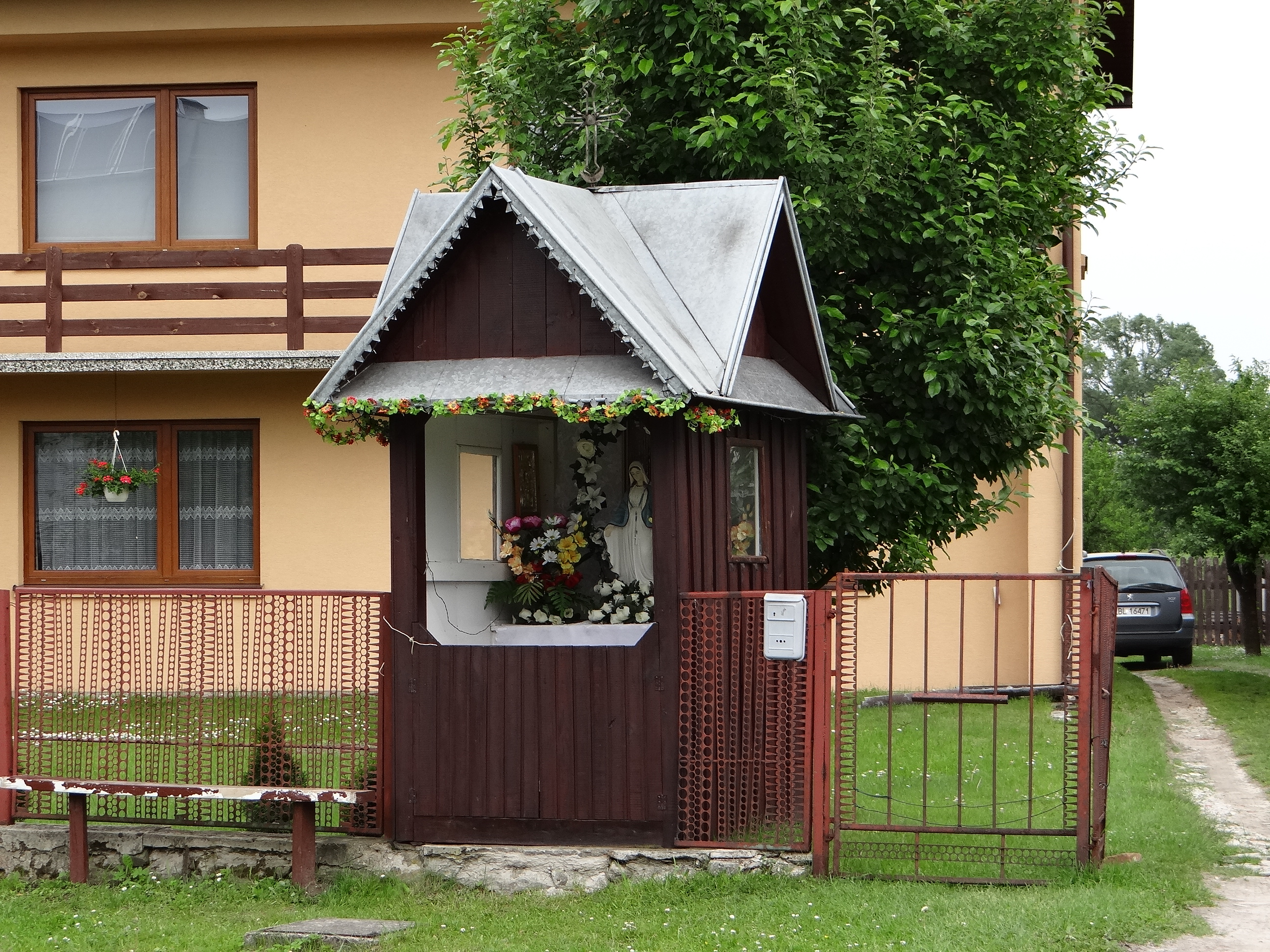 Zdjęcie wykonane w miejscowości Sól, gmina Biłgoraj.